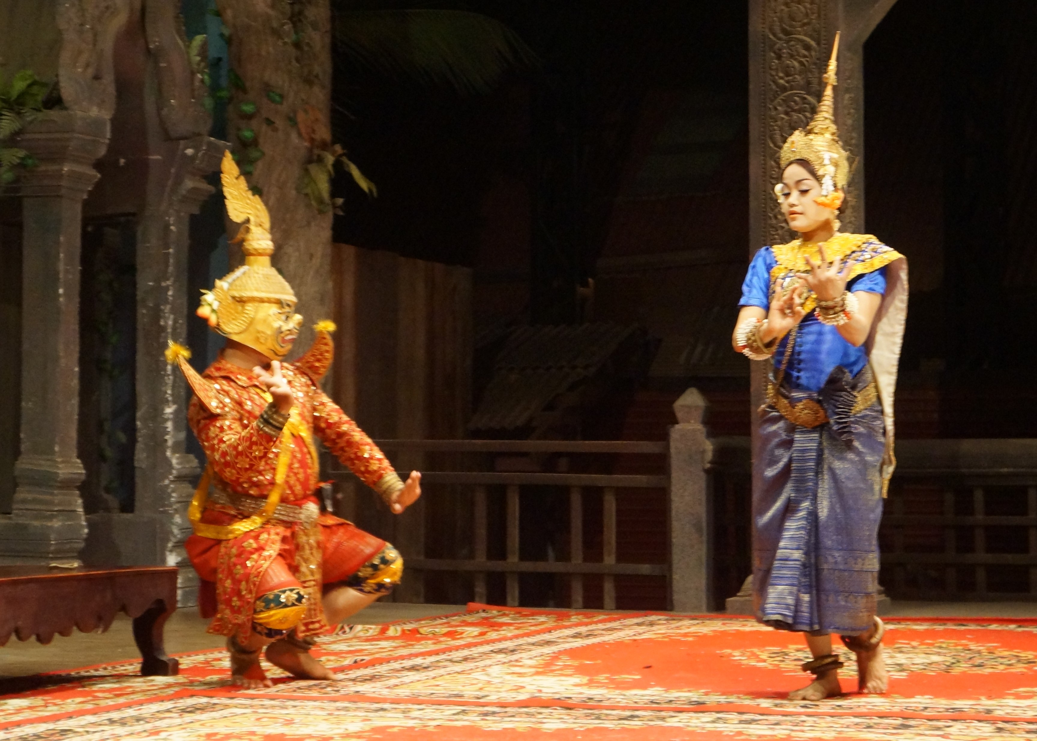 Cambodge, Danse classique cambodgienne à Siem Reap.